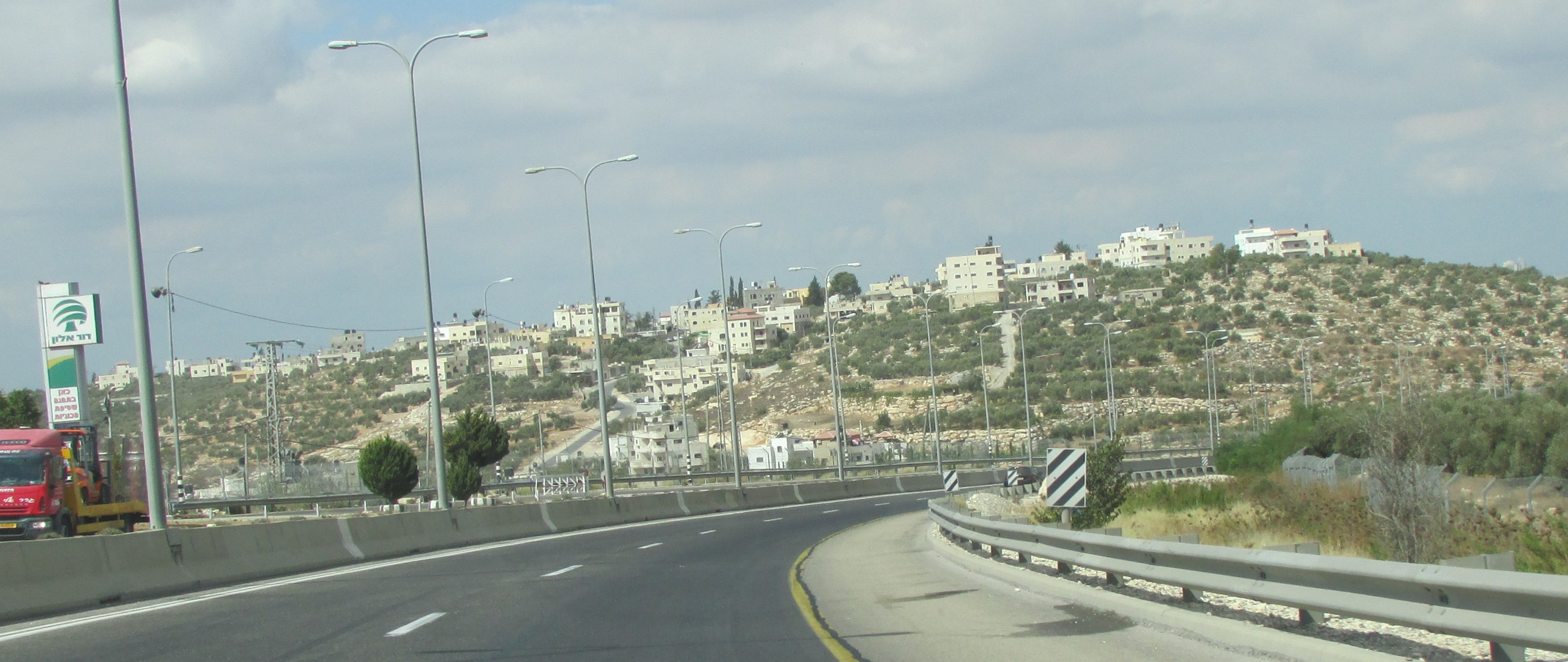 Kharbatha al-Misbah east entrance